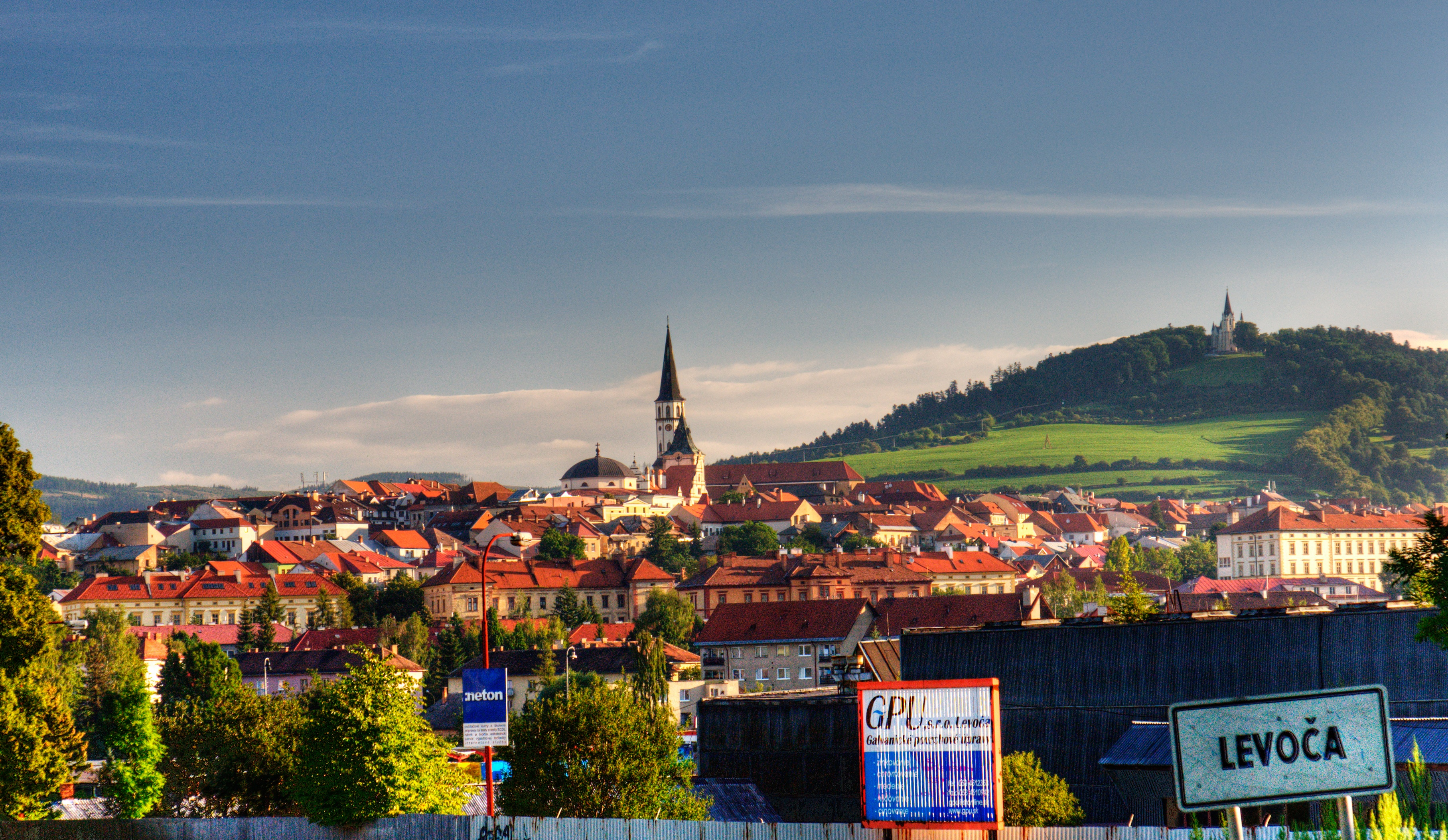 Widok na Lewoczę